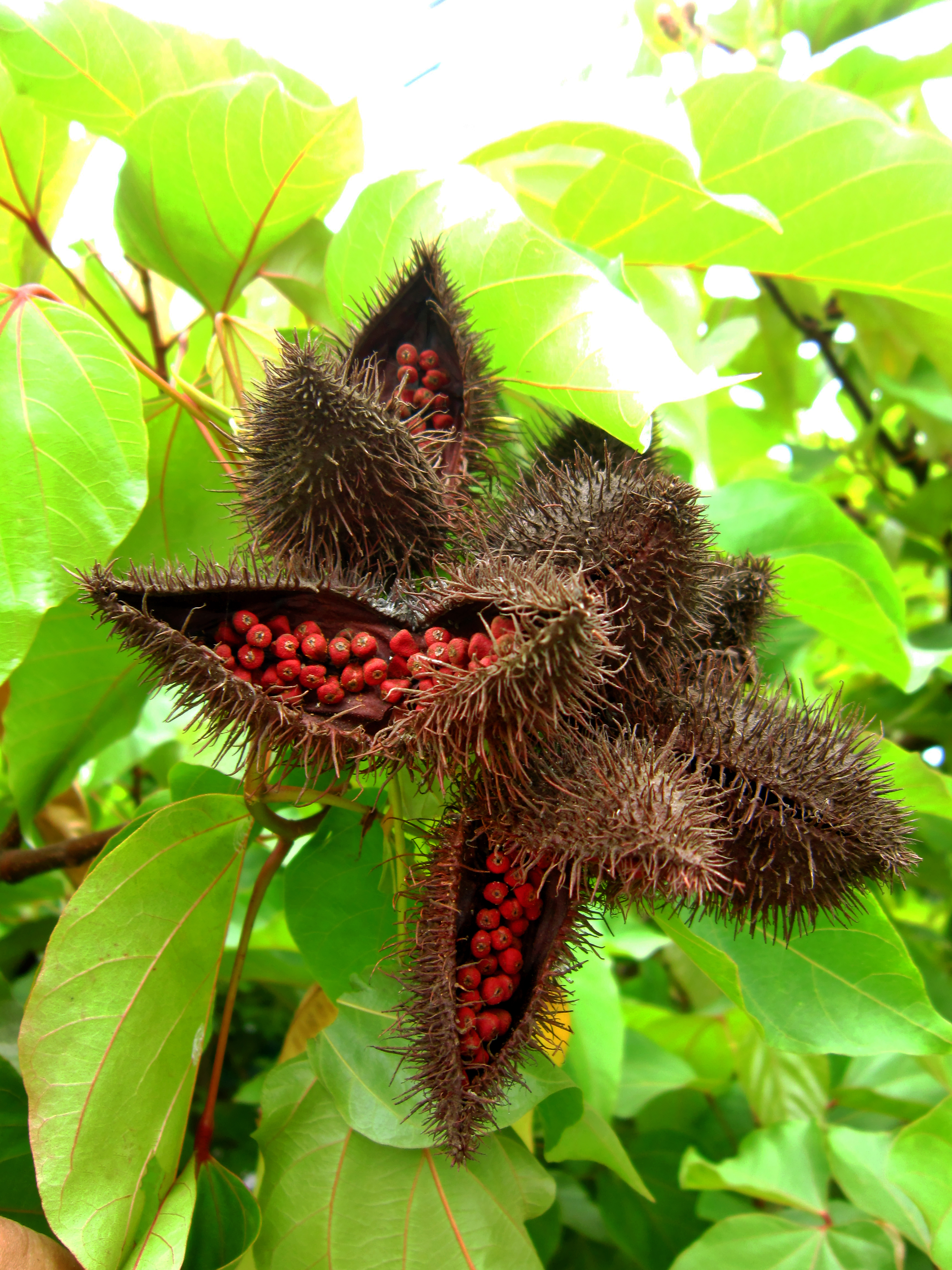 Quả điều màu (danh pháp hai phần: Bixa orellana) khi khô có màu nâu và tự nứt làm lộ các hạt đỏ bên trong.